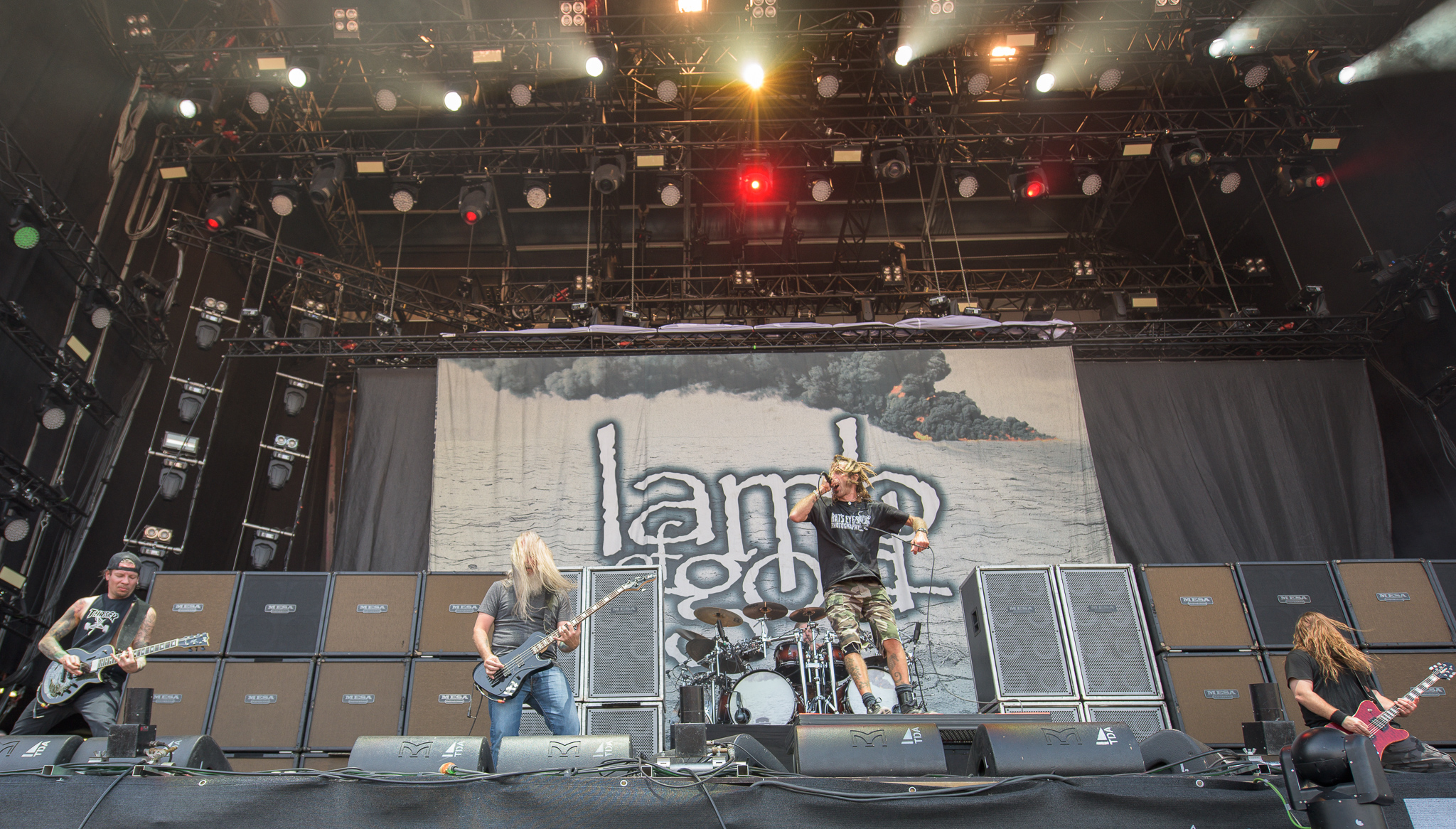 ARGO-Konzerte,Beck's Park Stage,Chris Adler,Festival,John Campbell,Konzert,Lamb of God,Livekonzert,Livemusik,Mark Morton,Musik,Randy Blythe,RiP,Rock im Park 2015,Willie Adler